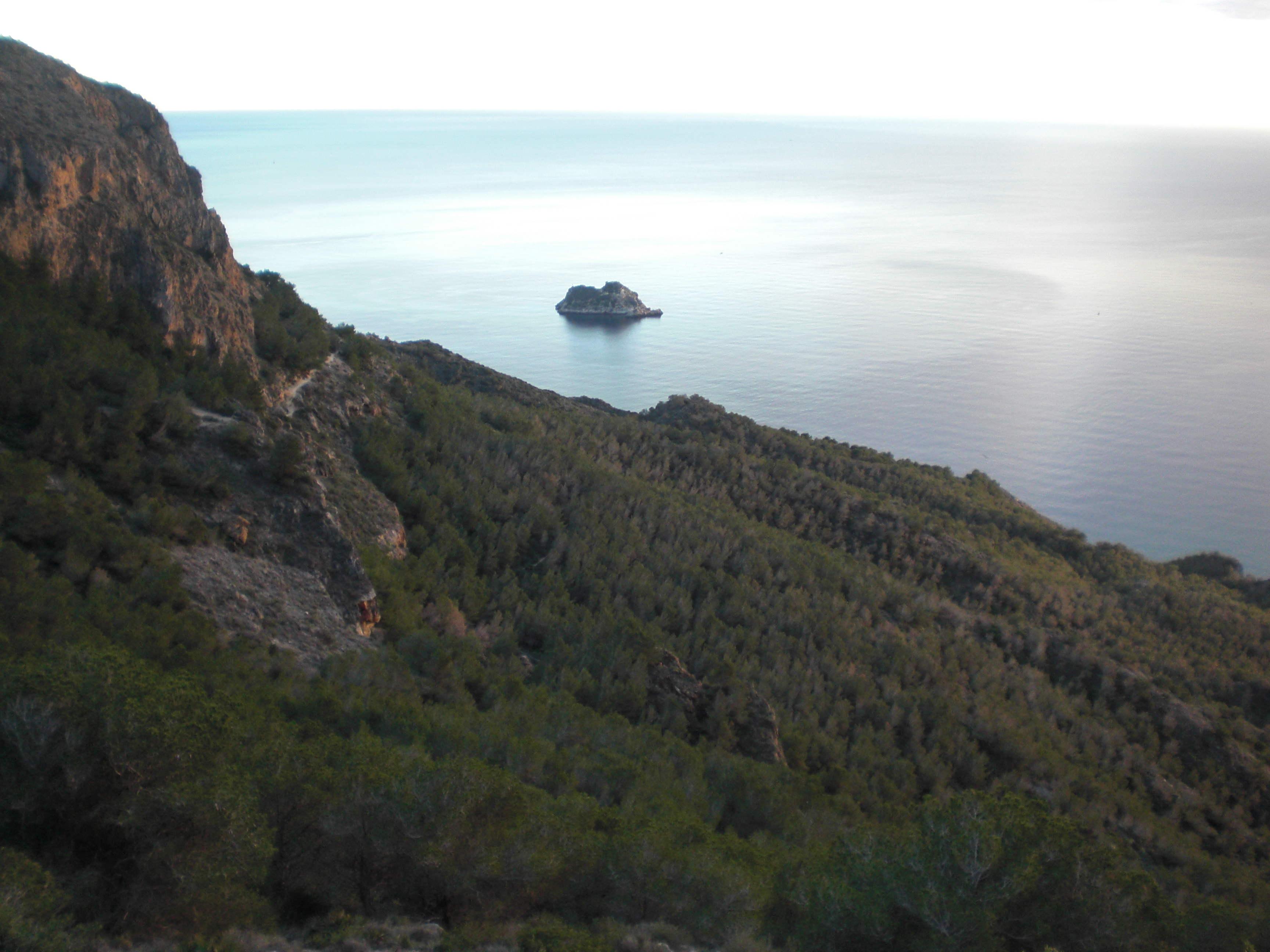 Isla de las Palomas desde mirador del monte Roldán, Cartagena